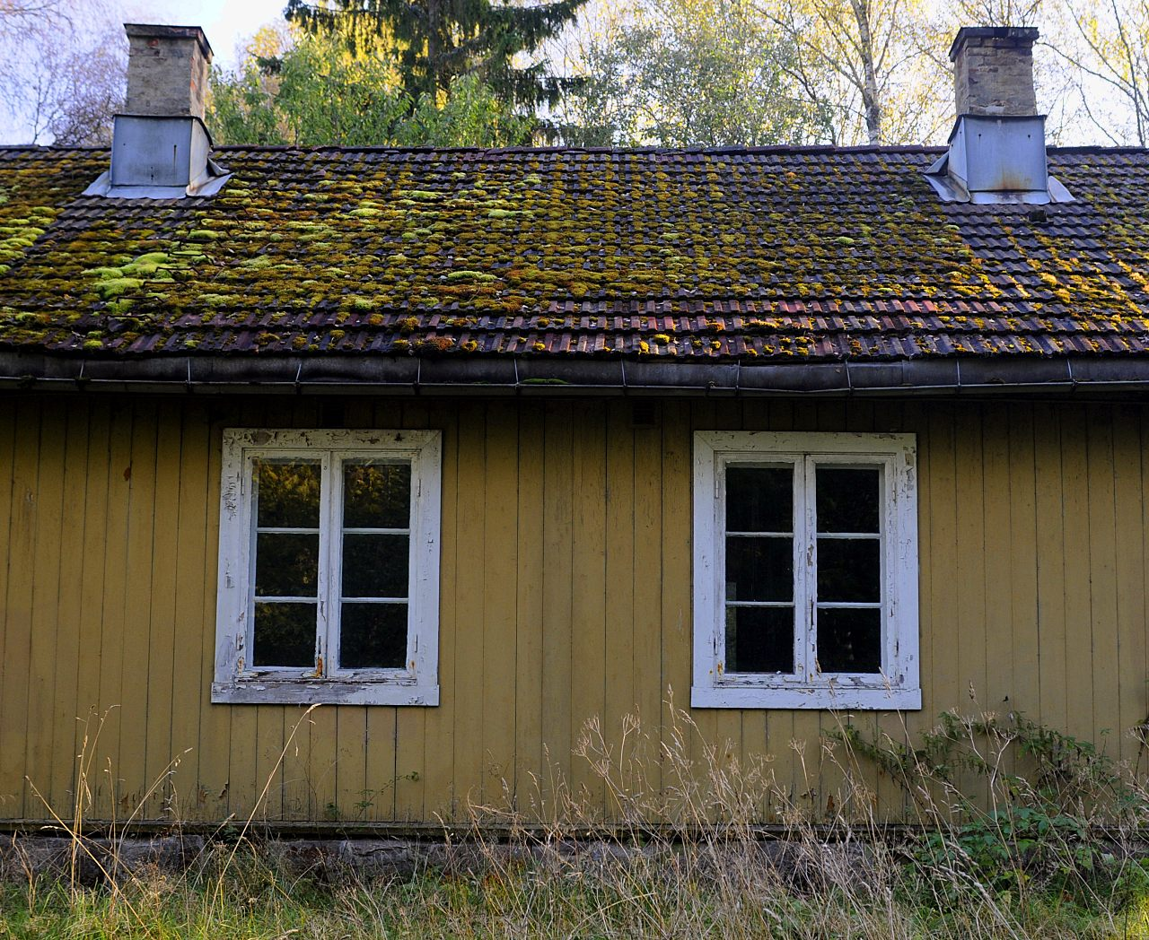 Bolighus ved Skar leir